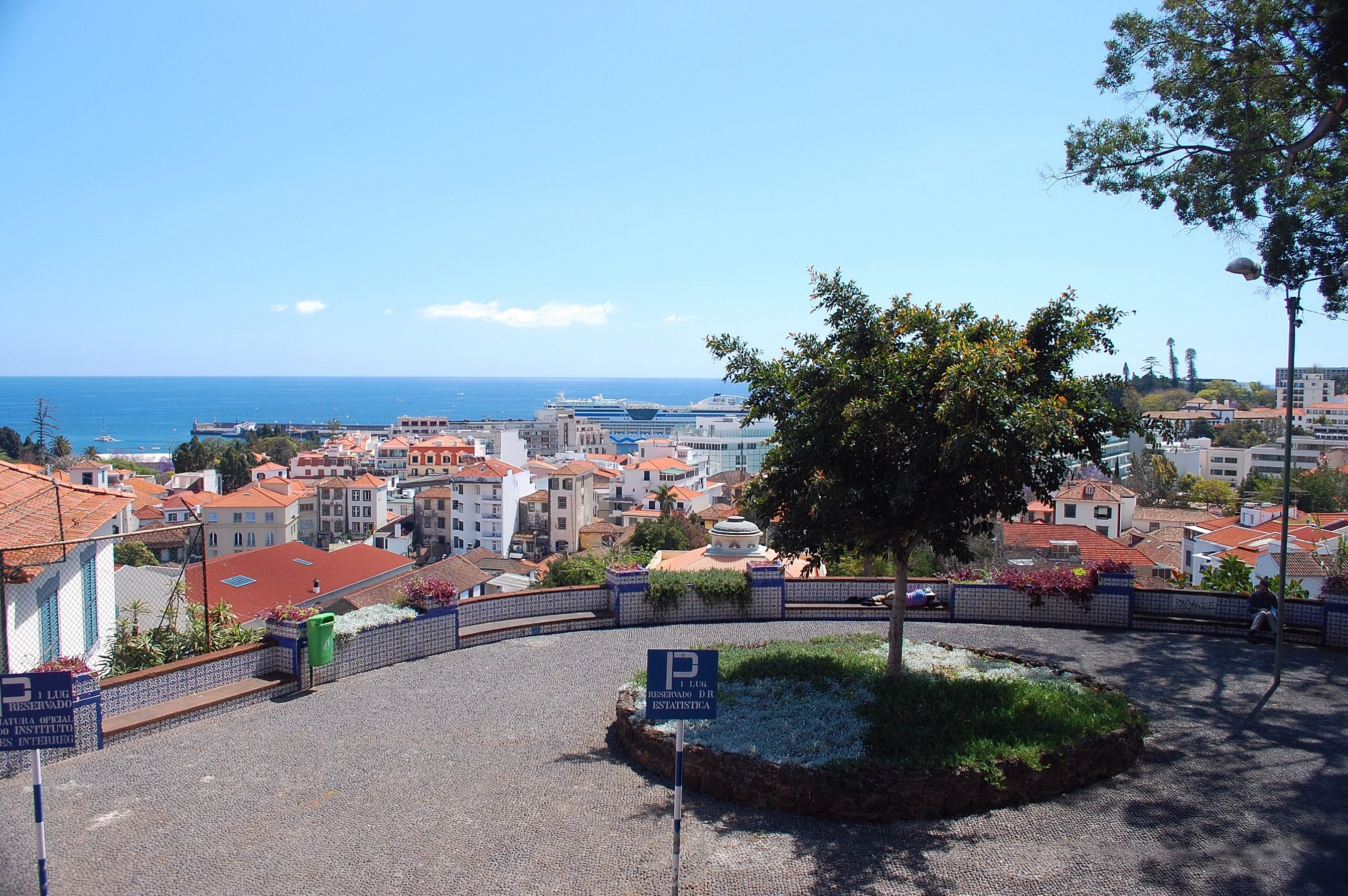 Largo das Cruzes, Funchal